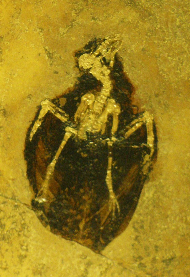 Fossil of Hassiavis, an extinct bird- Took the photo at Senckenberg Museum of Frankfurt